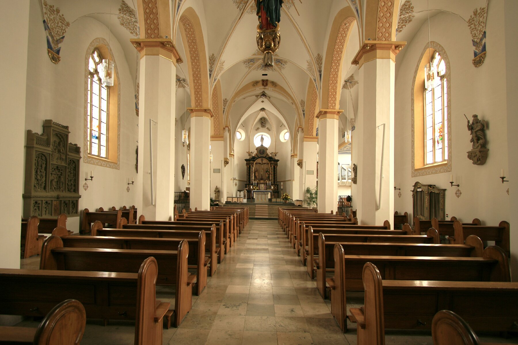 Innenansicht der Kirche St. walburga in Meschede